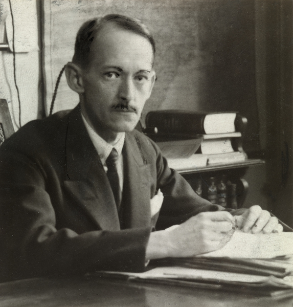 portrett, mann, jurist, ekspedisjonssjef, sittende halvfigur ved skrivebord.